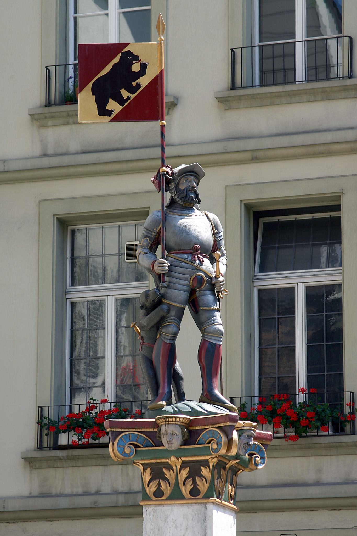 Vennerbrunnen, Bern, Switzerland